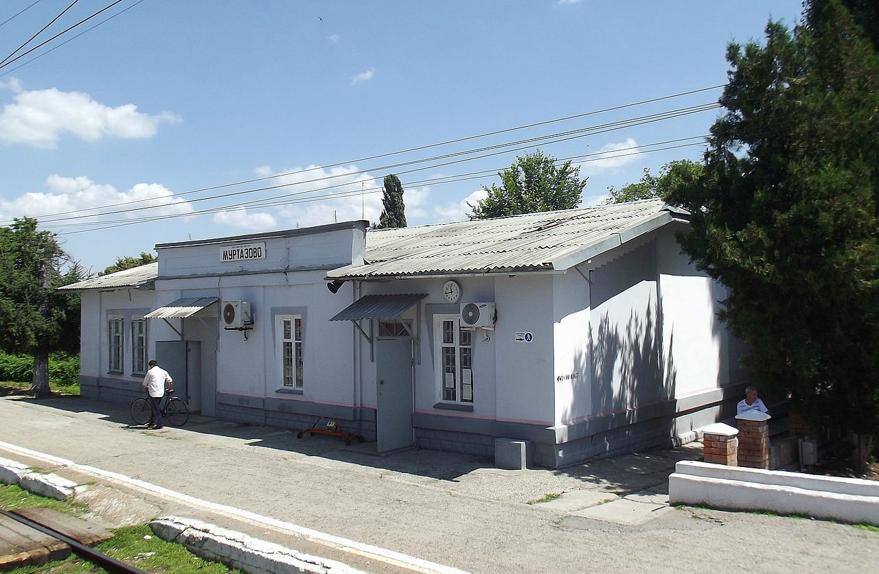 Железнодорожный вокзал станции Муртазово